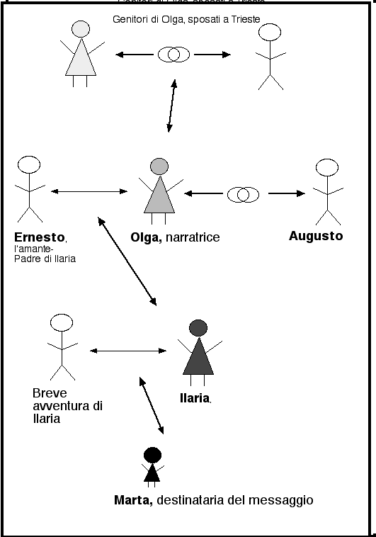 Susanna Tamaro. Characters in Va' dove ti porta il cuore